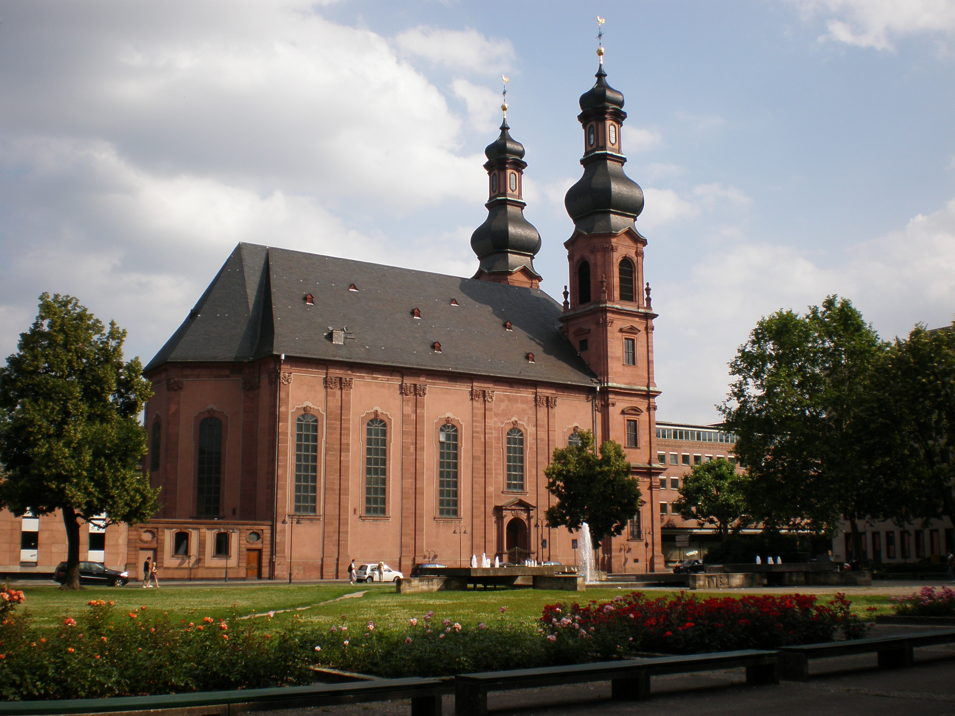 St. Peter Mainz mit Ernst-Ludwig-Platz und Jubiläumsbrunnen